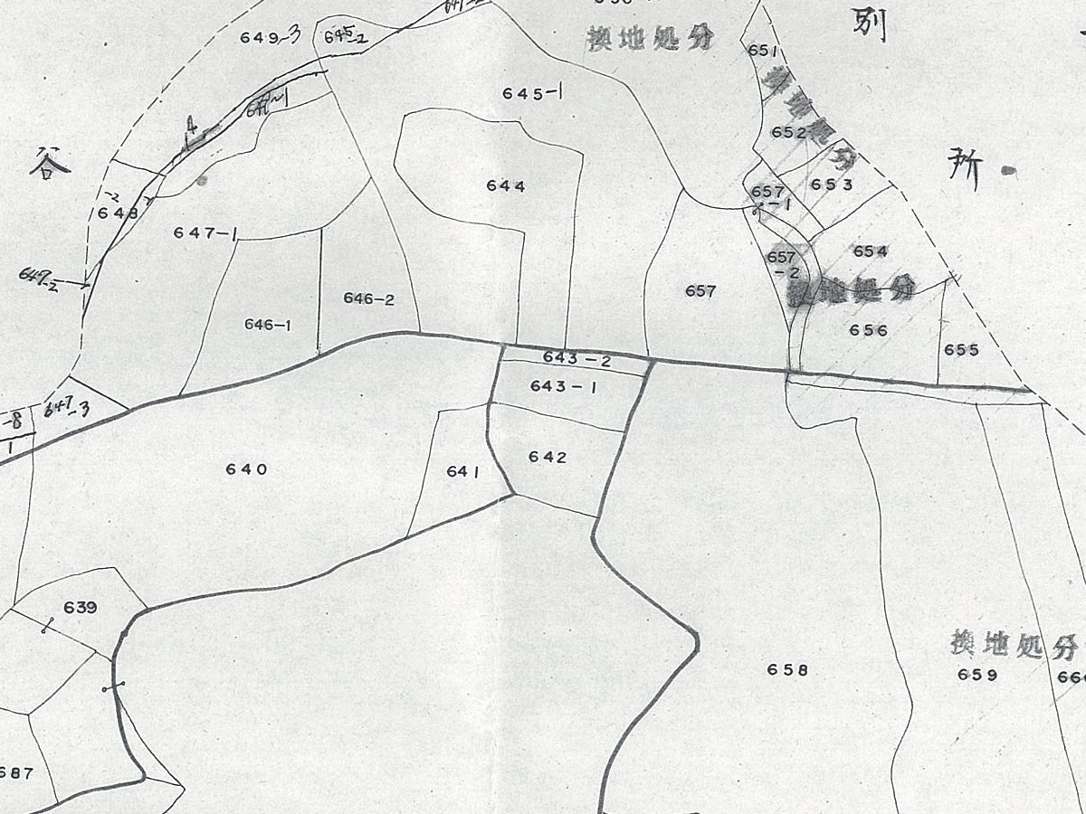 滋賀県大津市和邇北浜字住吉に係る閉鎖された地図に準ずる図面の写し